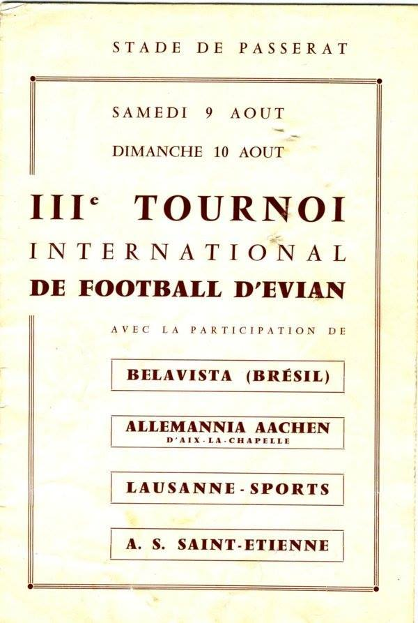 chamada torneio